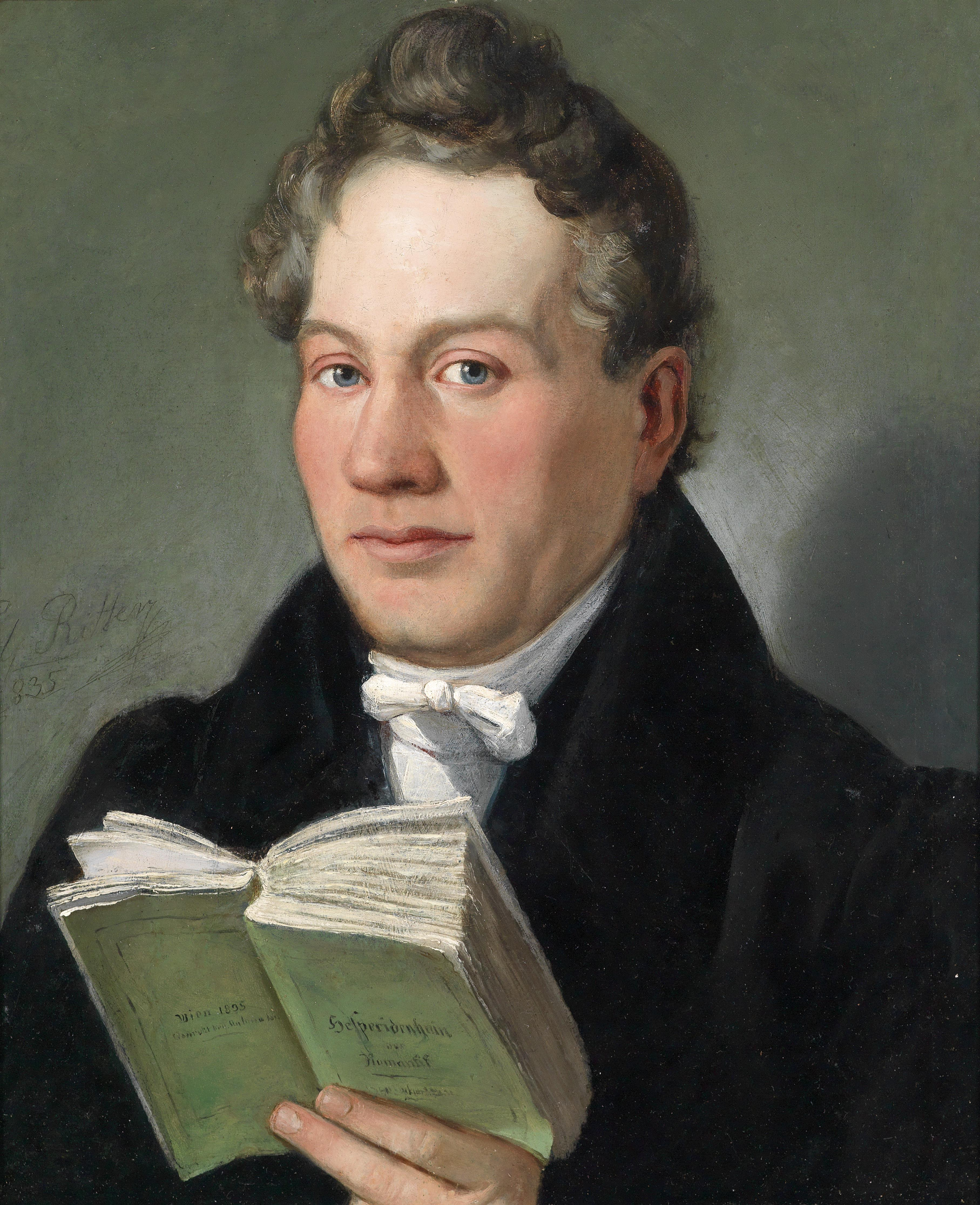 Portrait des Wiener Schriftstellers Christoph Kuffner (1777–1846) mit seinem Buch Hesperidenhain der Romantik